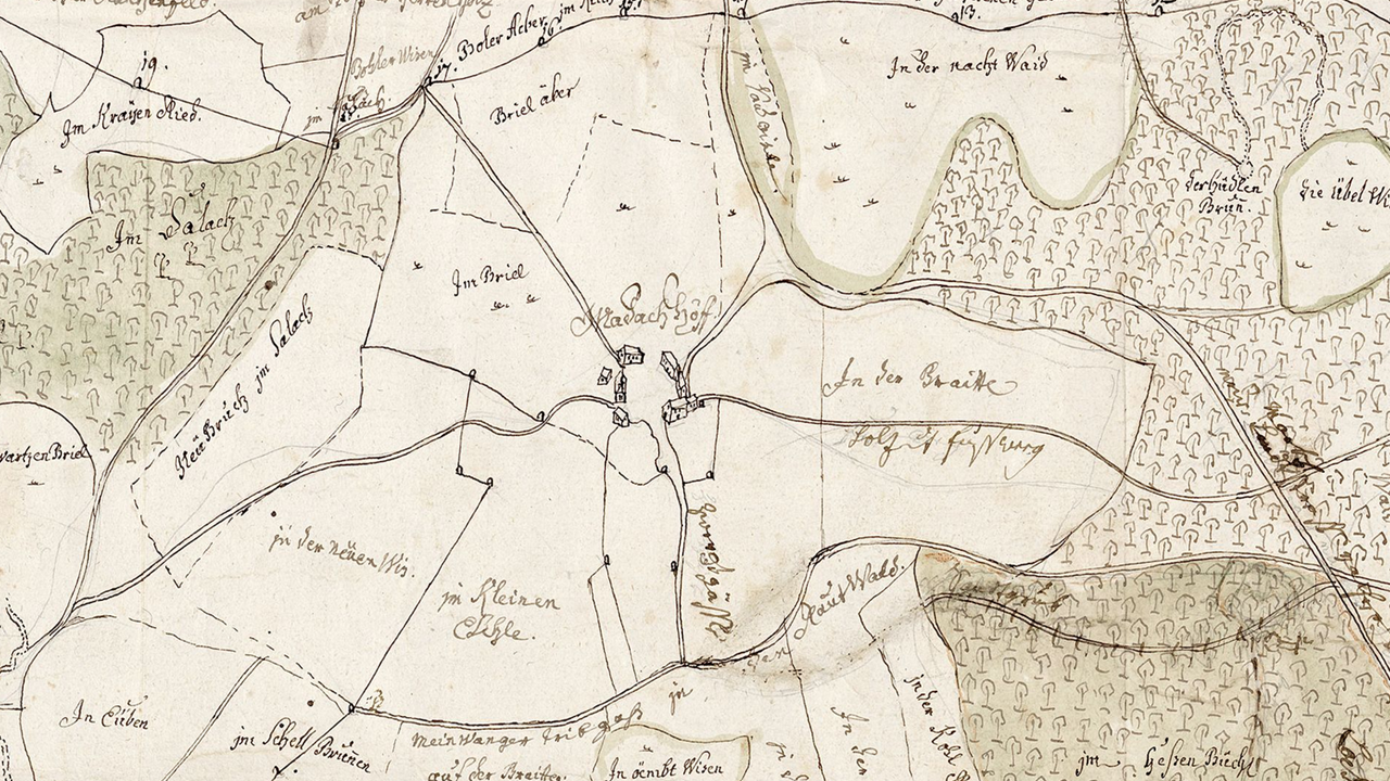 Deutschland (D) - Baden-Württemberg (BW) - Landkreis Konstanz (KN) - Mühlingen: Der Madachhof in einer Karte von 1765 (Ausschnitt)